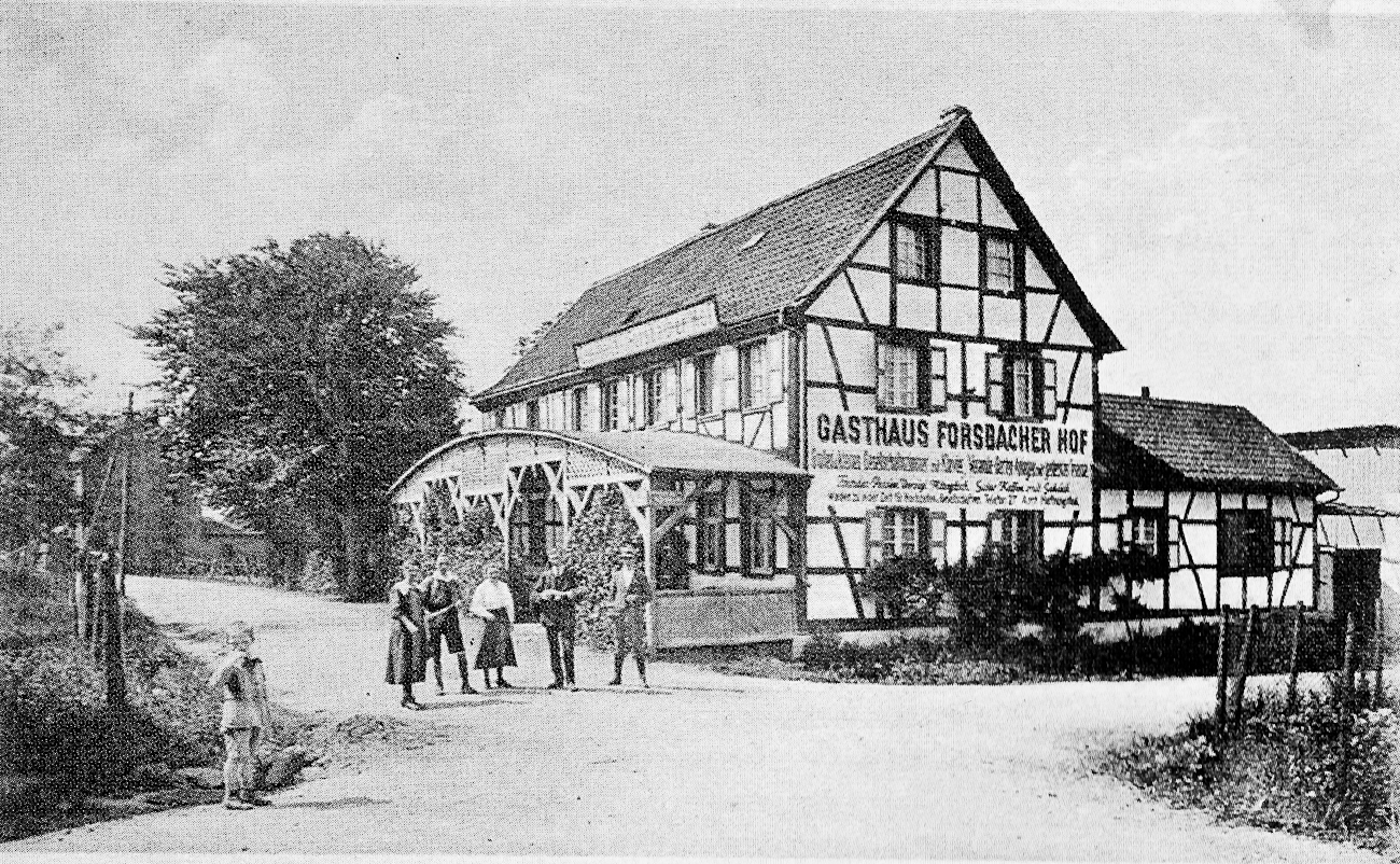 Der Forsbacher Hof um die Jahrhundertwende auf einer alten Postkartenansicht